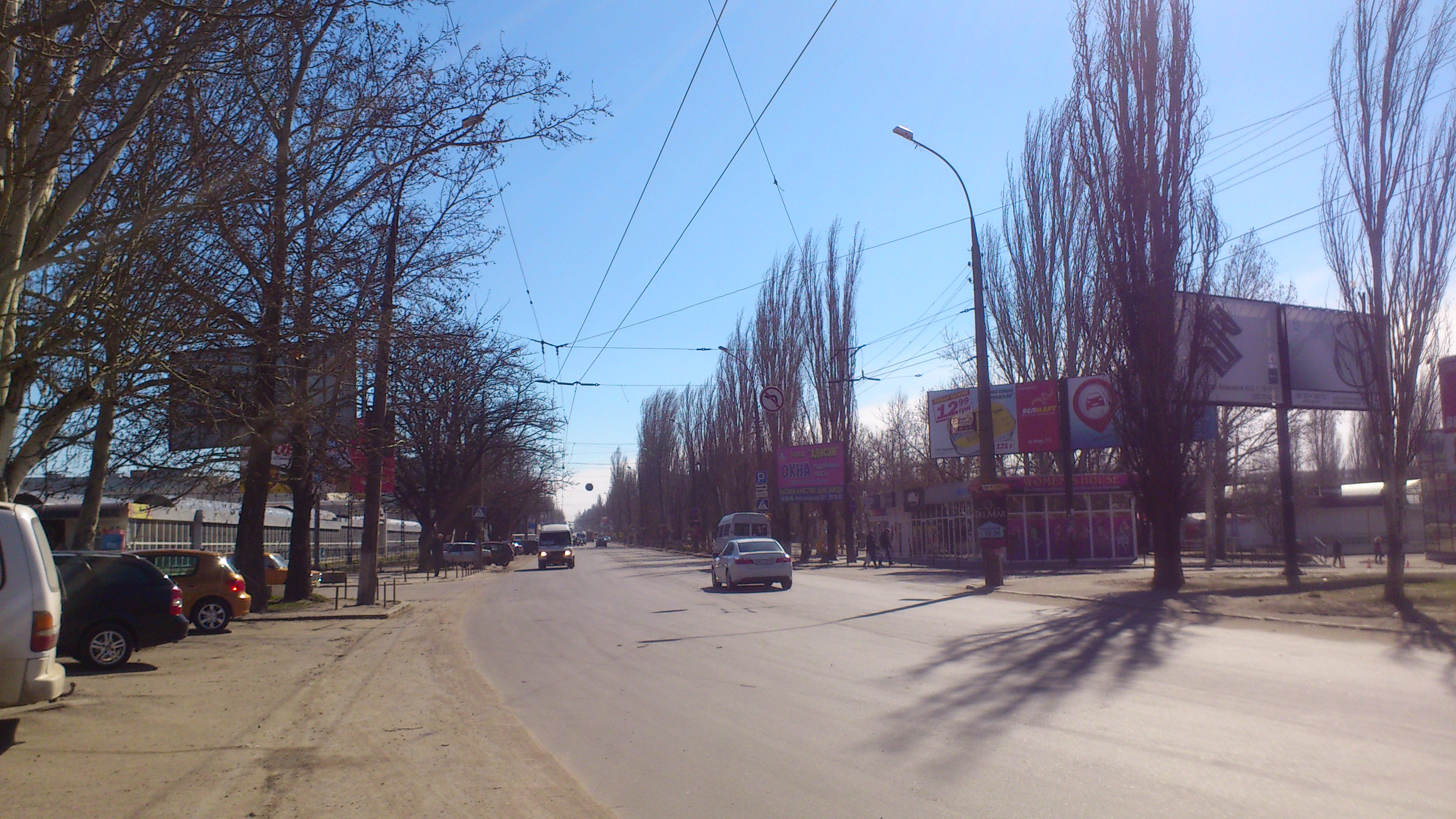 Миколаїв проспект Миру, початок від Жовтневого проспекту